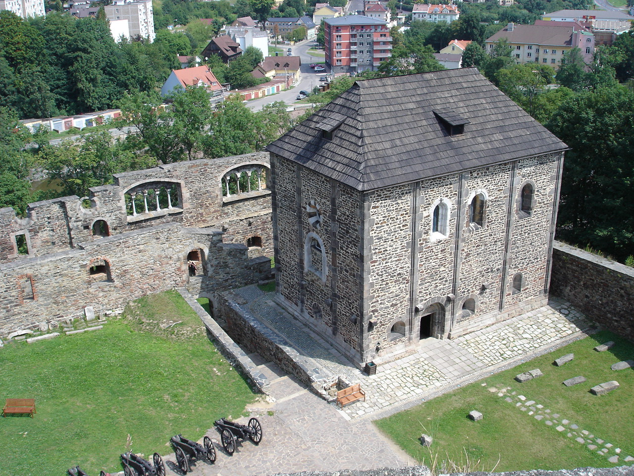 Chebský hrad - kaple